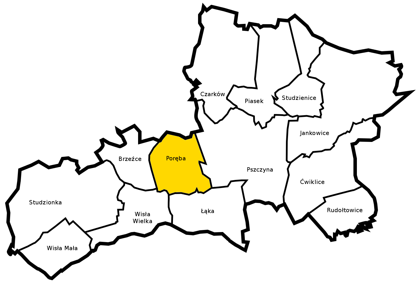 Gmina Pszczyna - sołectwo Poręba